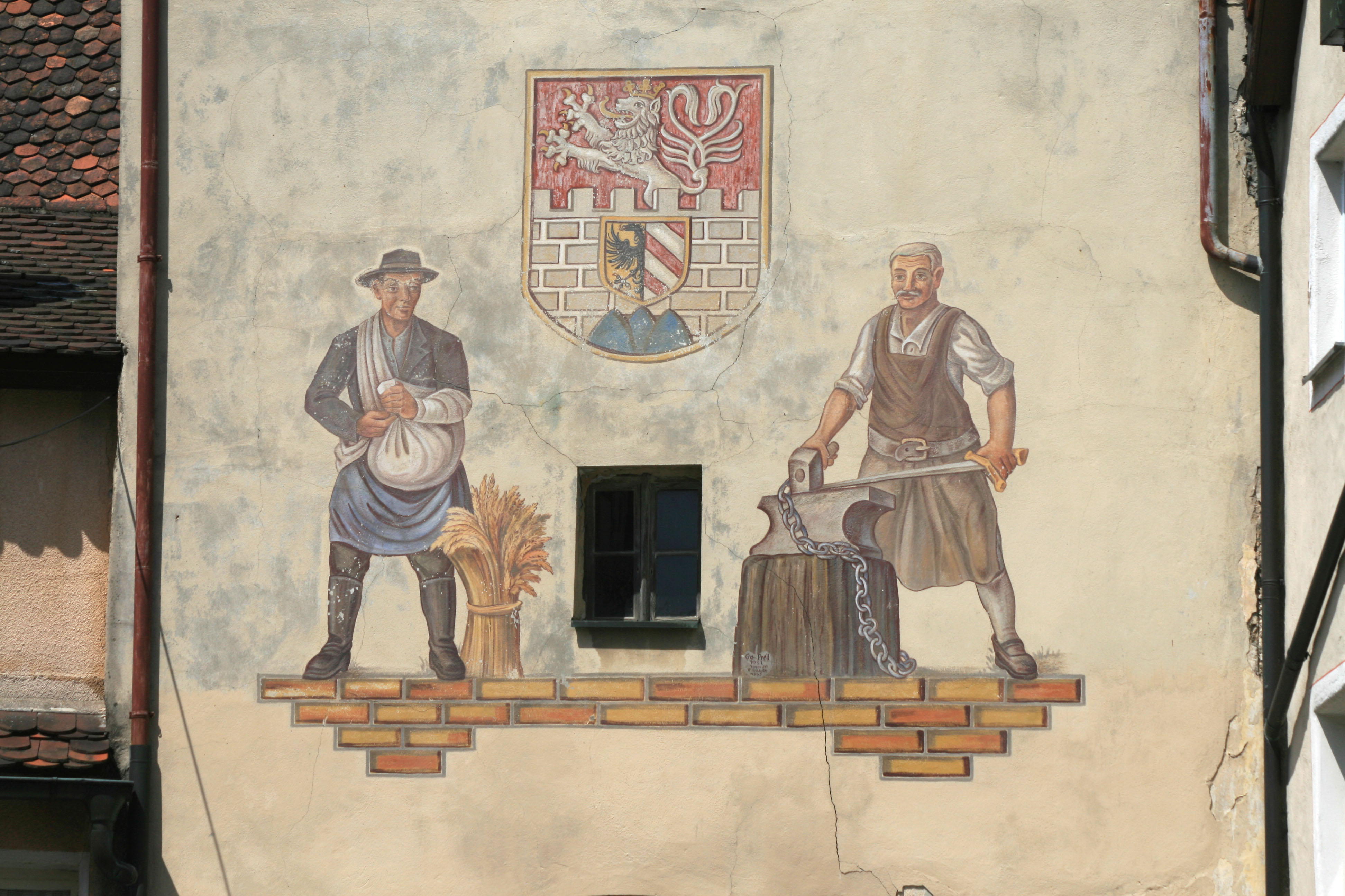 Gemälde am Stadttor in Gräfenberg (Hiltpoltsteiner Tor)